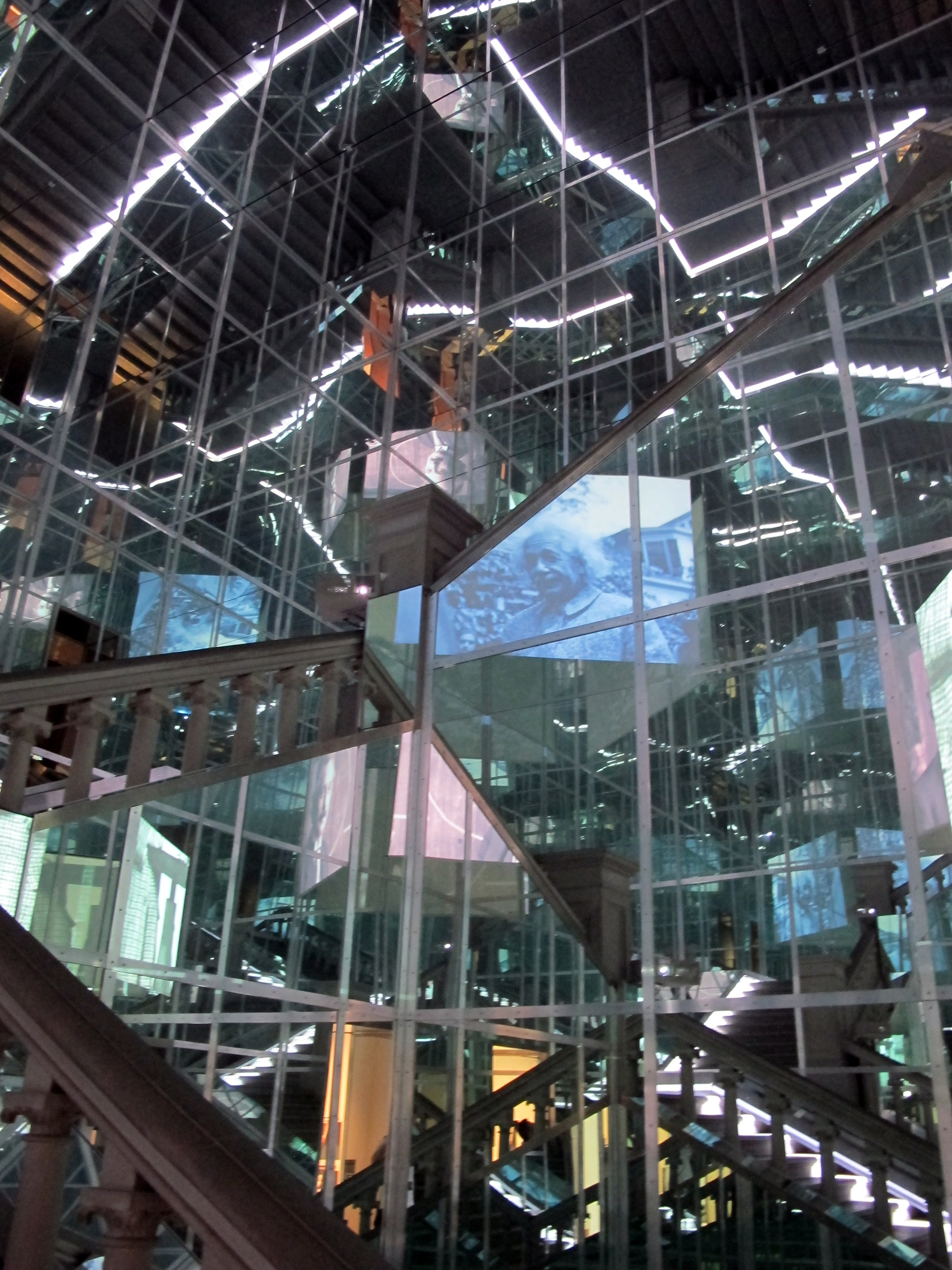 Historisches Museum Bern